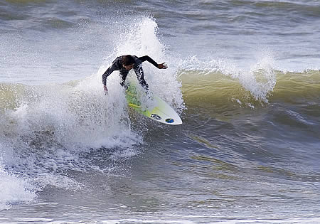 Surfer - Les Grenettes - La Noue/Sainte-Marie-de-Ré - Île de Ré - Charente-Maritime Photo issue de ma banque d'images : Pep.per 8 octobre 2006 à 00:37 (CEST)